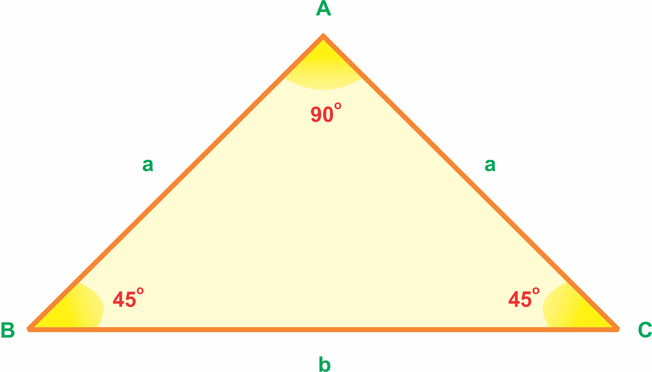 Square triangles scales